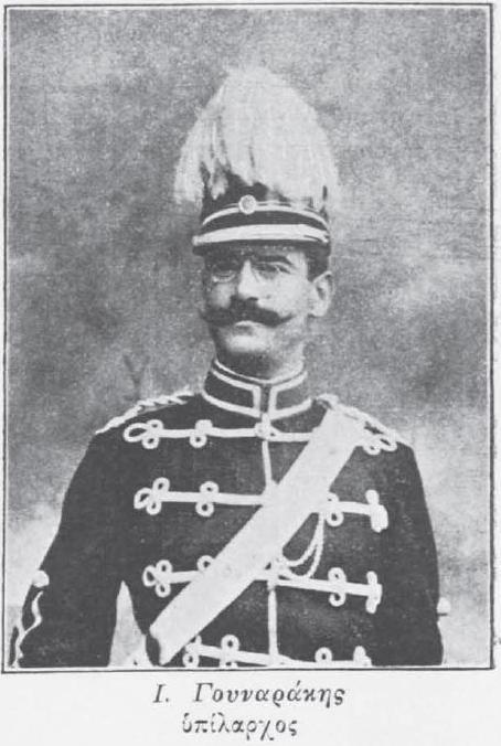 griechischer Militär, 19. Jahrhundert